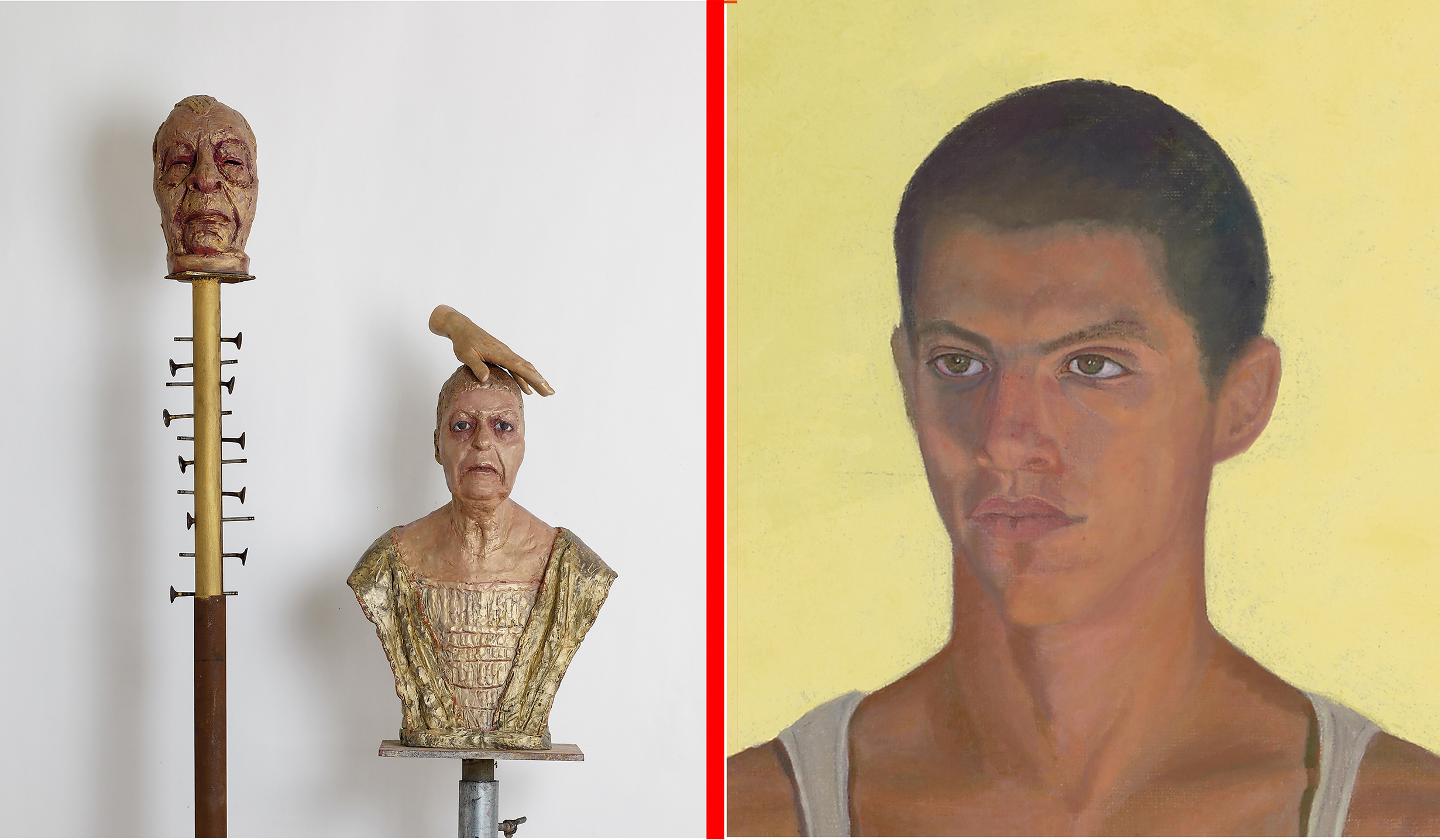 חוה ראוכר, כריכת קטלוג , 2014, צילום: אבי אמסלם Hava Raucher, Catalogue Cover, 2014